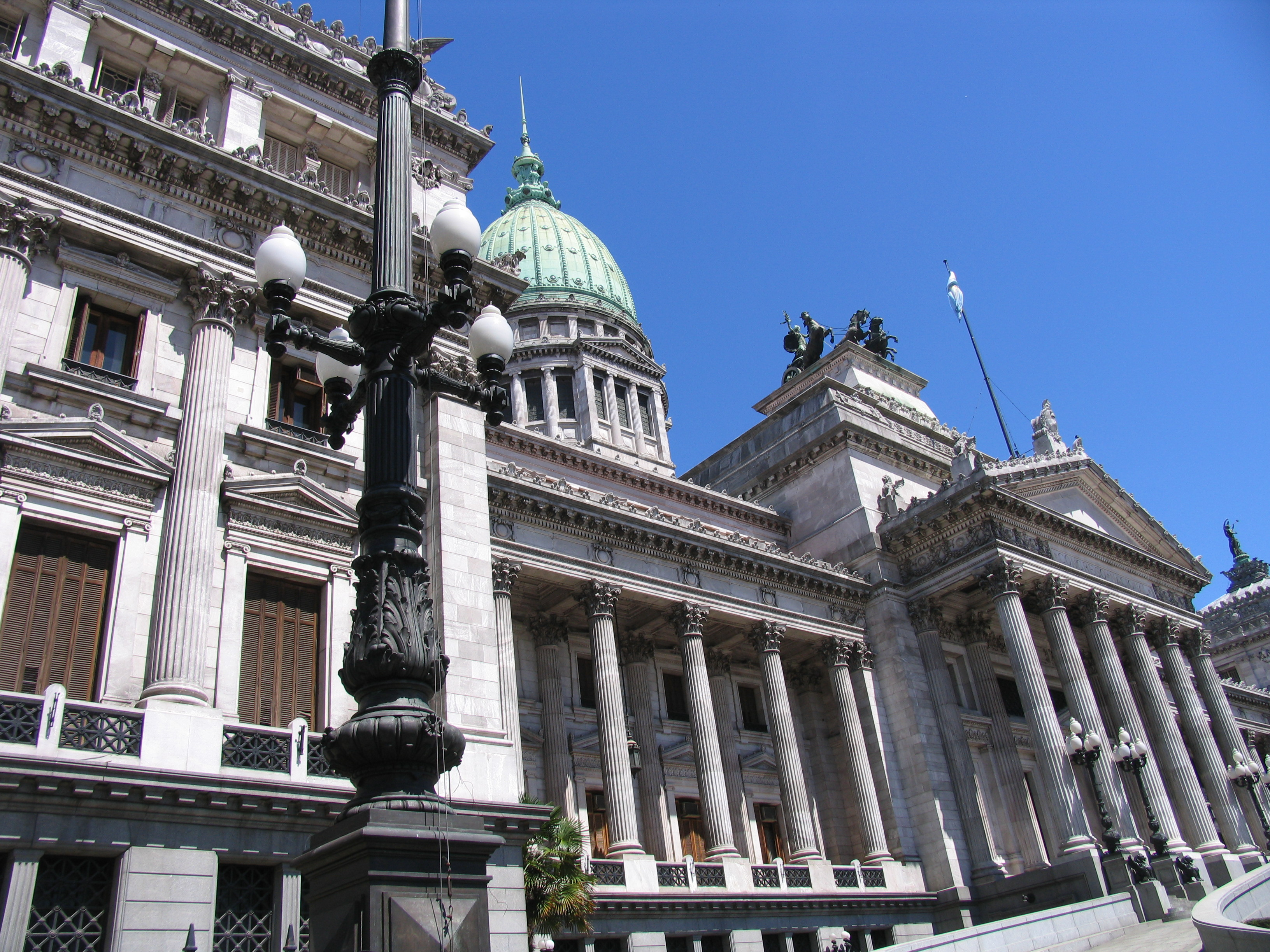 Edificio del Congreso en Buenos Aires, Congress building in Buenos Aires, Kongressgebäude in Buenos Aires.